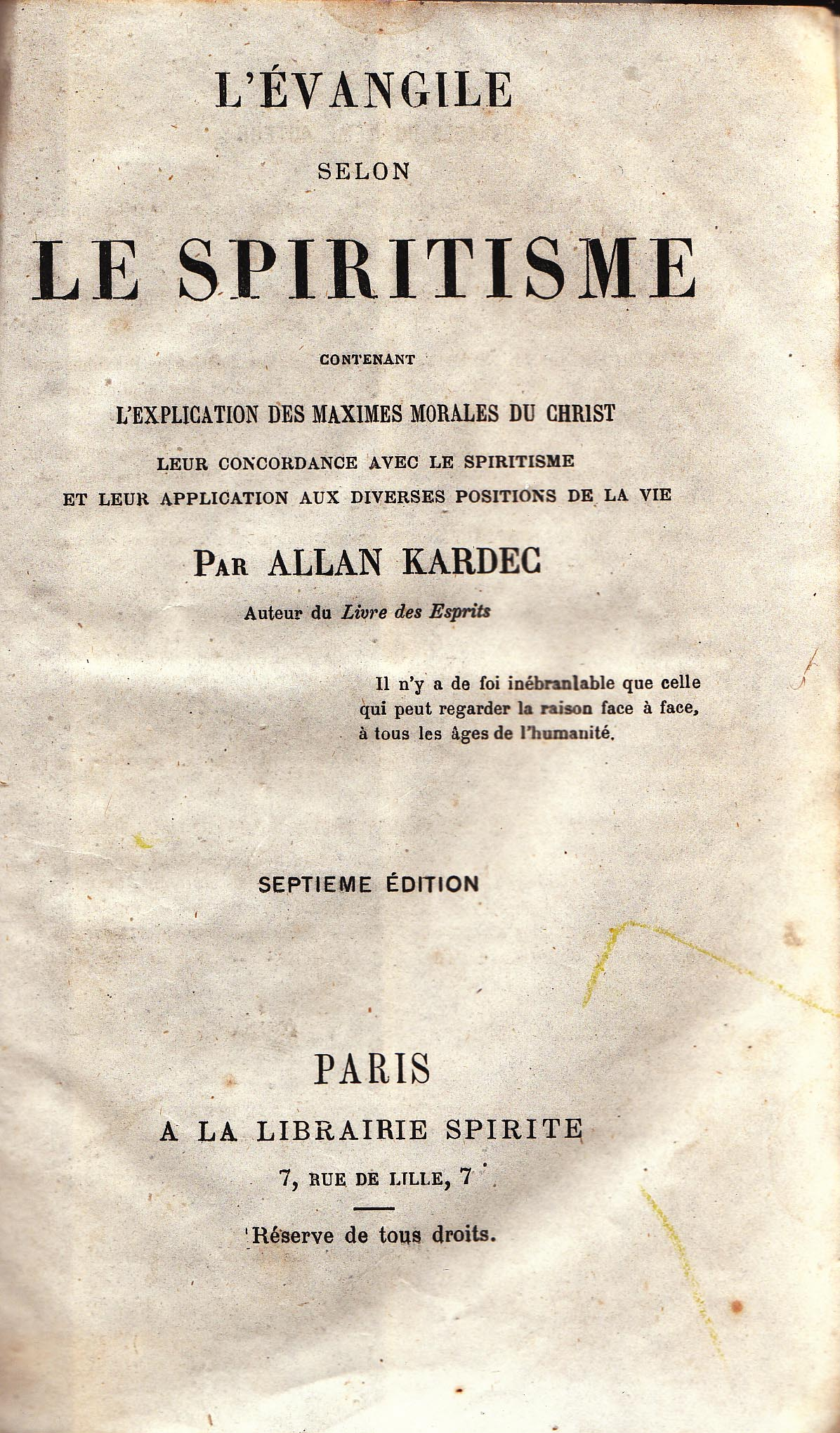 Allan Kardec Page de garde de L'Evangile selon le spiritisme. Edition de 1871